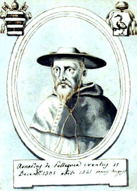 Cardinal Arnaud de Pellegrue